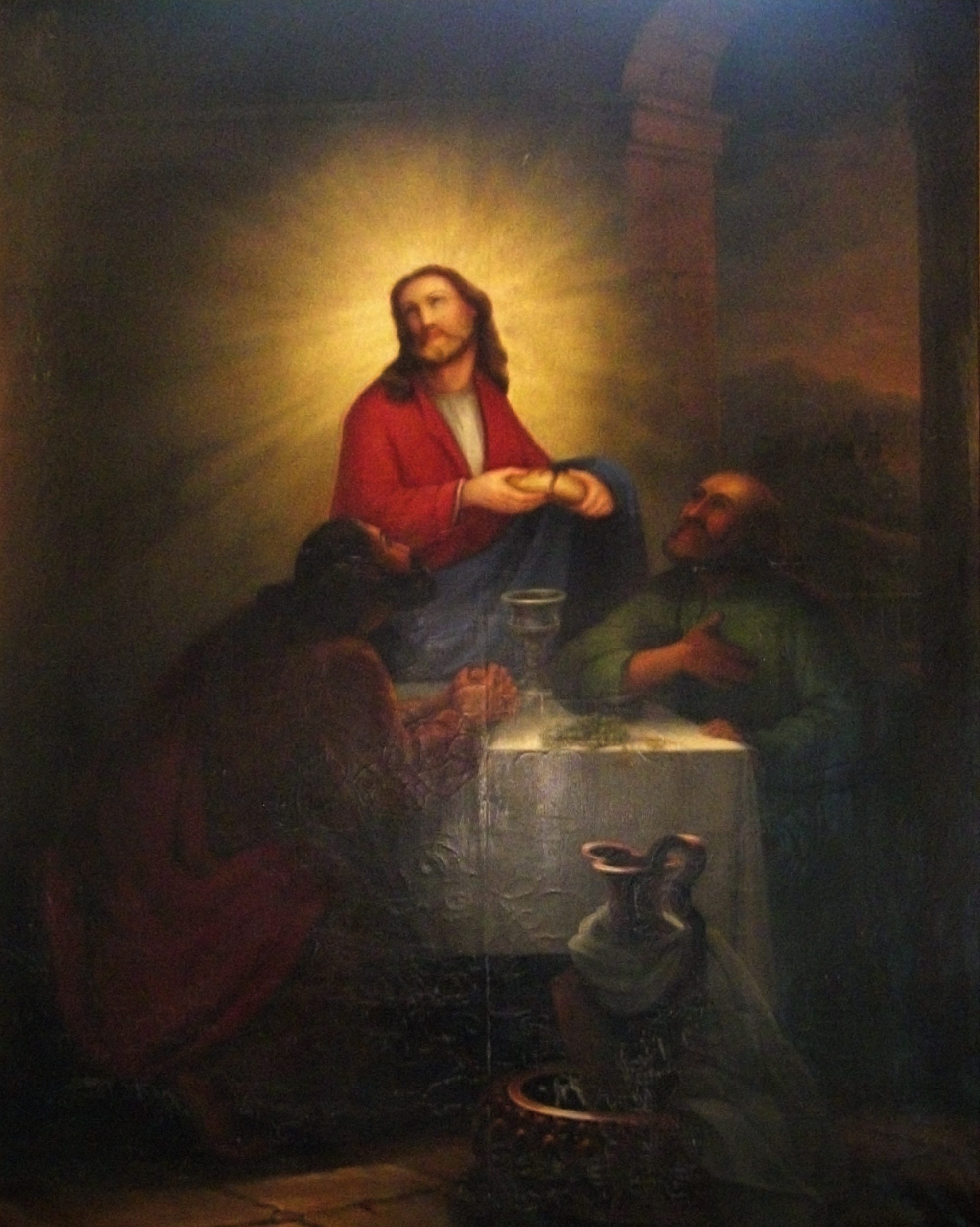 Kristus och Emmauslärjungarna, oljemålning av Marina Kylberg. Altartavla i Tuns kyrka.